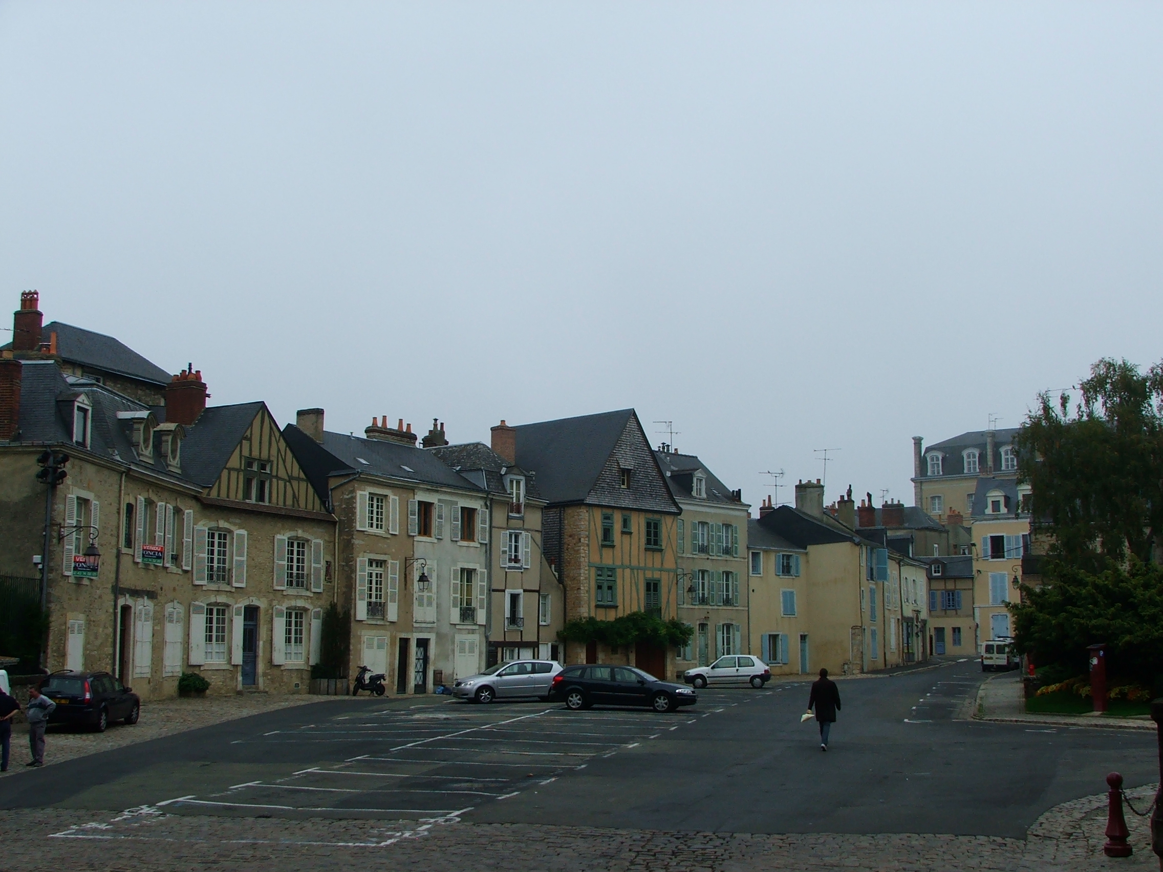 La place du Cardinal Grente au matin dans le vieux Mans depuis le parvis de la Cathédrale.